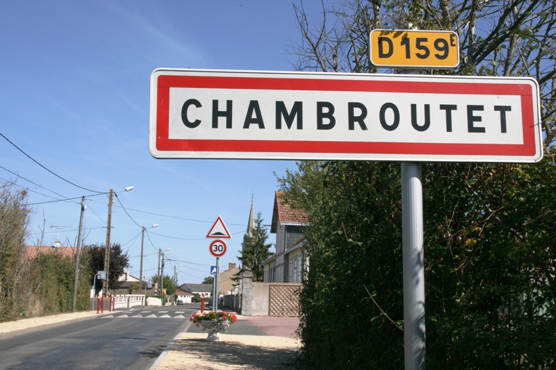 Français